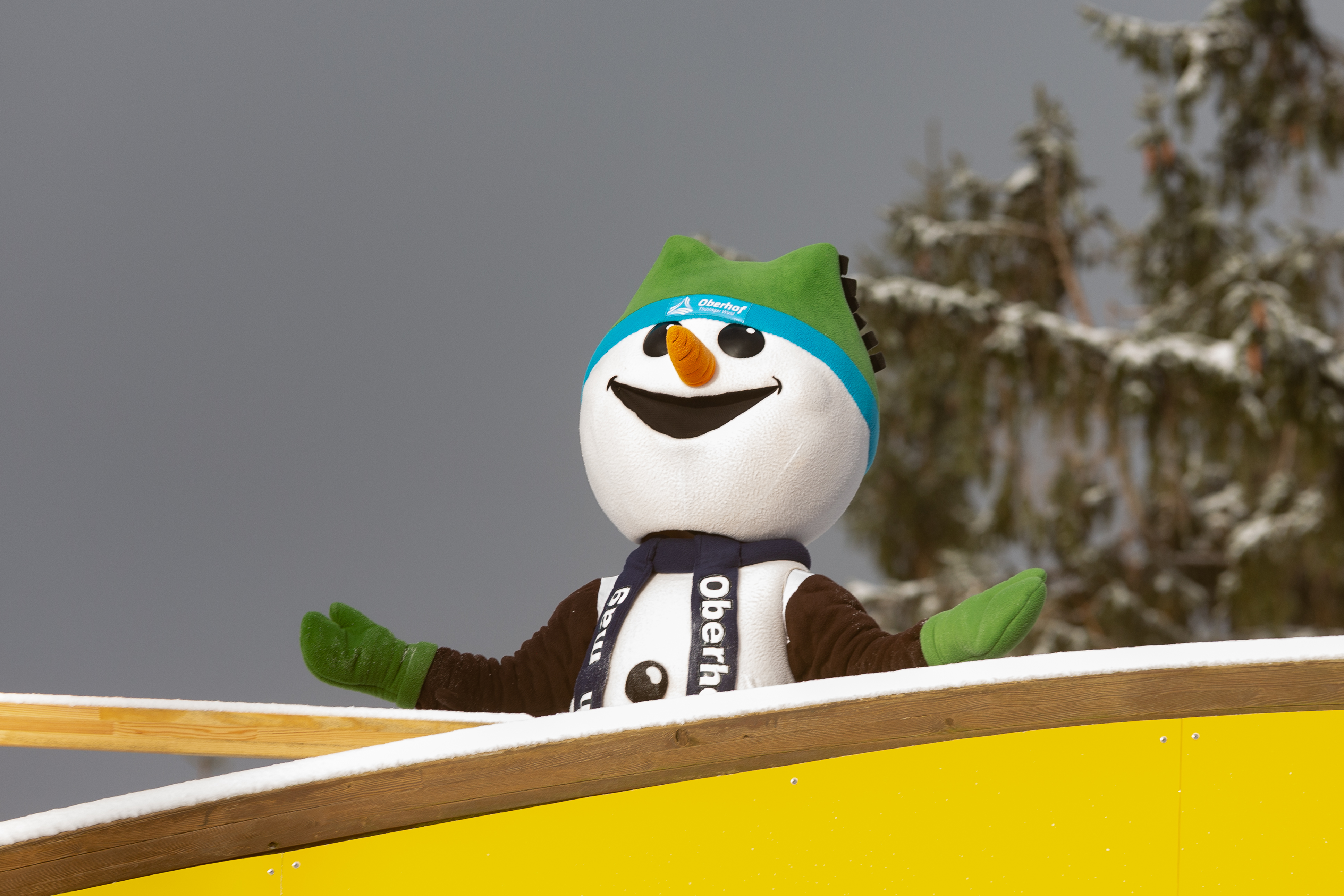 Pressekonferenz zur Vorbereitung des Biathlon-Weltcups und der Umbenennung der Ski-Arena; Maskottchen "Flocke" freut sich über Sonne